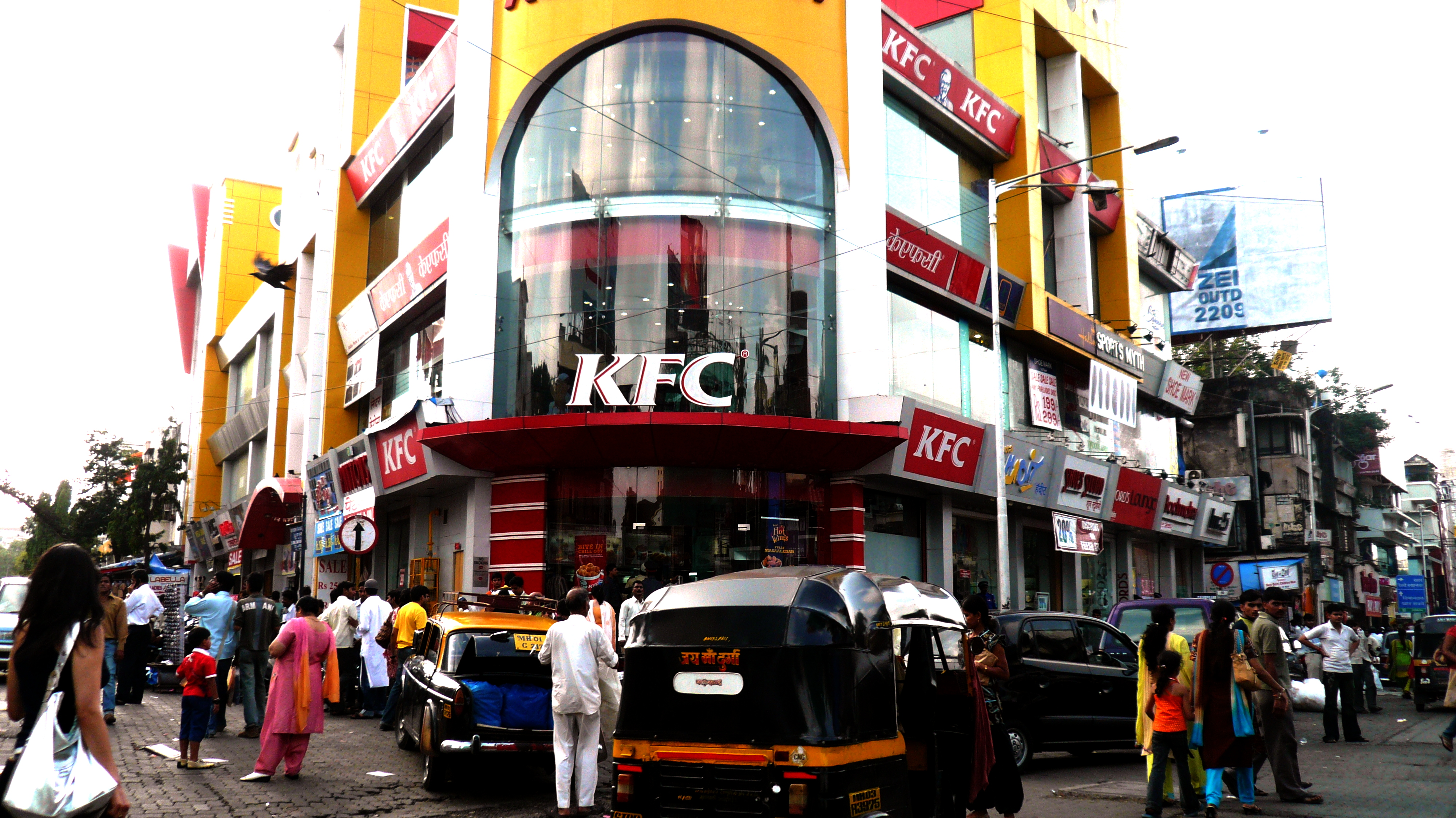 KFC, Mumbai, India